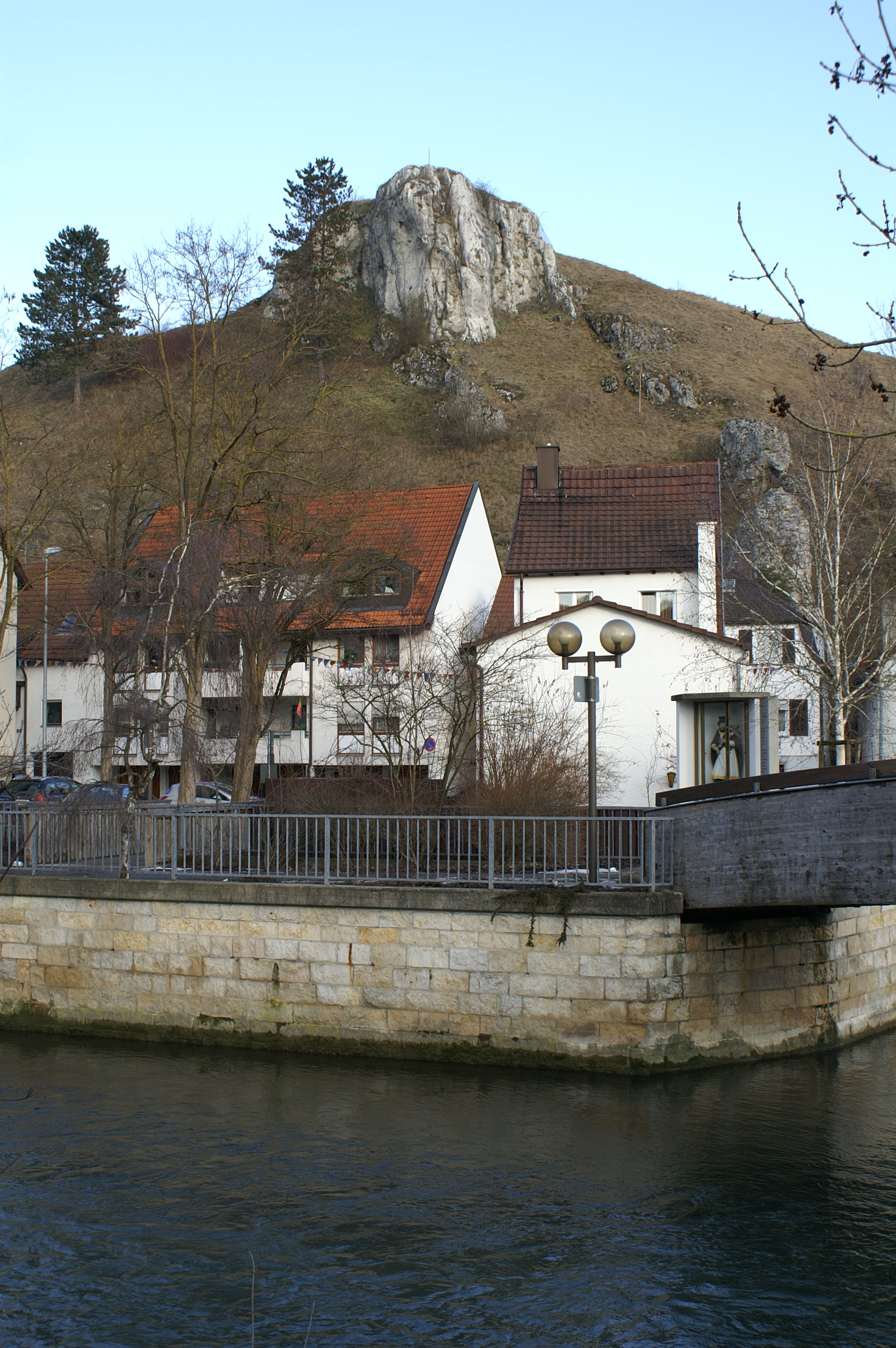 Blaustein mit Blau (Fluss) und Löwenfelsen